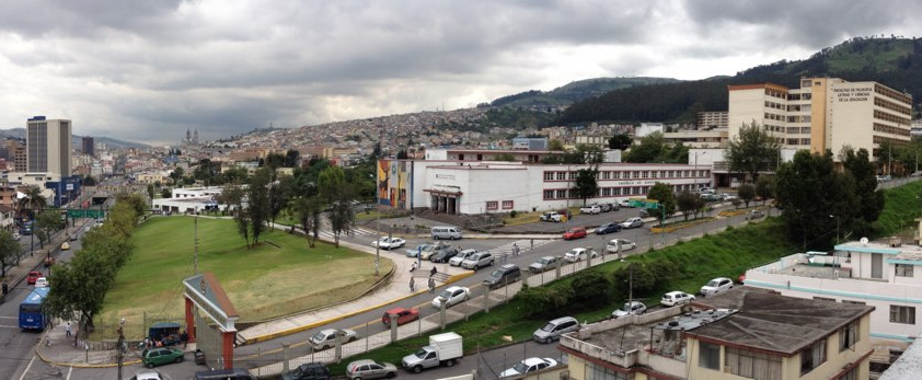 Universidad Central del Ecuador y su ingreso norte por la Av. América, la mítica Facultad de Jurisprudencia y la de Filosofía.